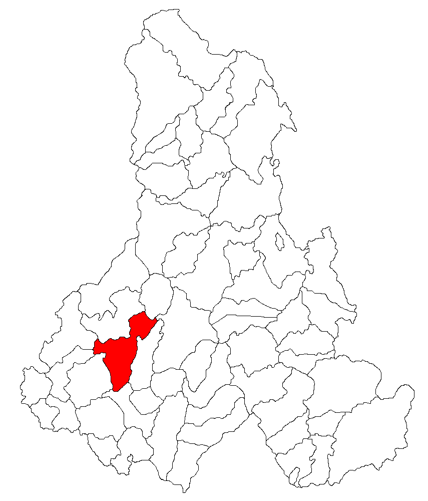 Categorie:Hărţi ale judeţului Harghita Contents 1 Licensing 2 Sursă 3 Licensing 4 Original upload log Licensing Sursă ro::Imagine:Harta_jud_Harghita.png